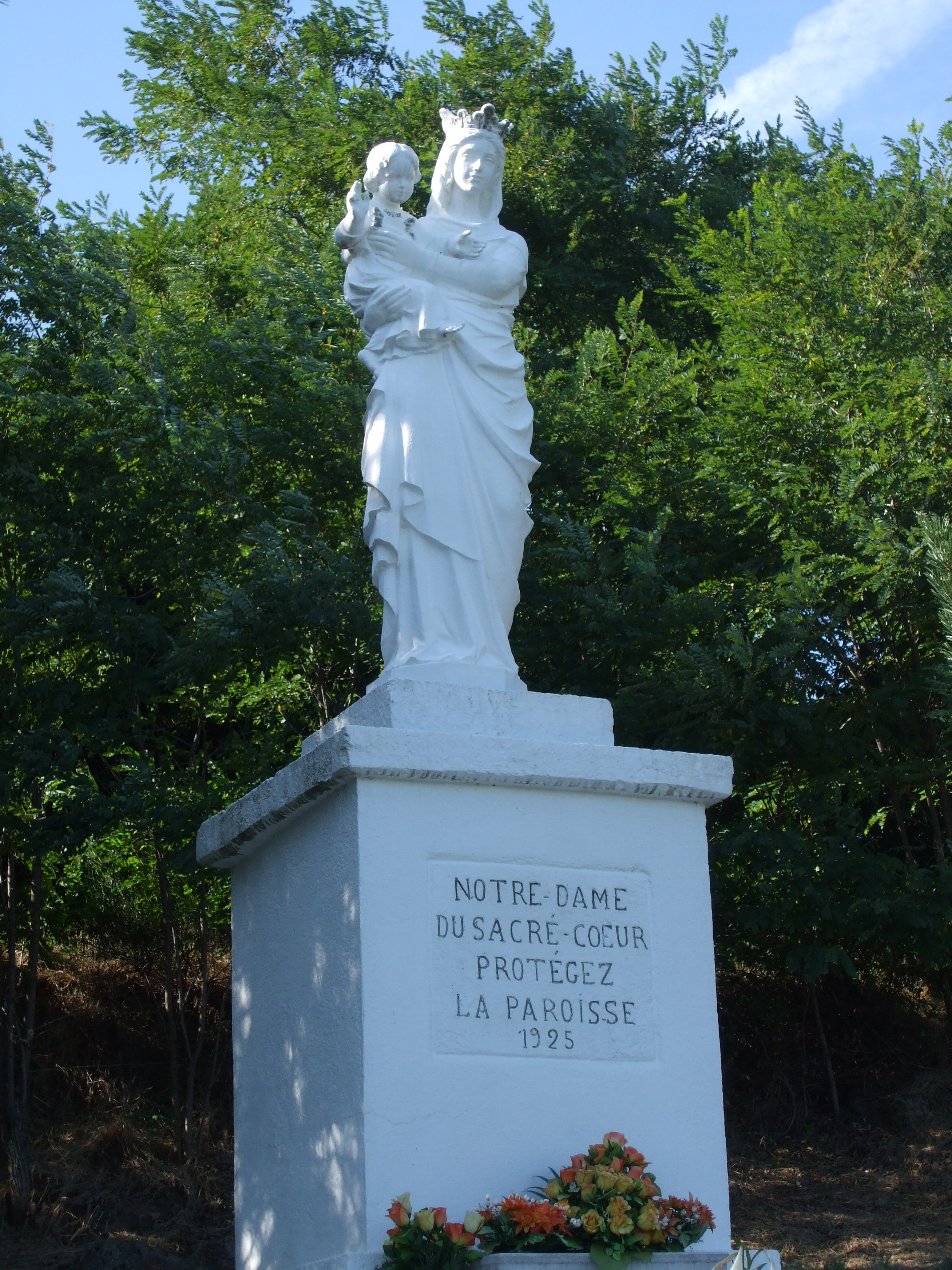 statue de Notre Dame du Sacré-Cœur érigée en 1925 - Empurany (Ardèche)